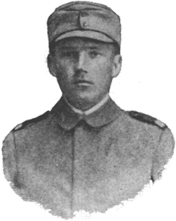 Description